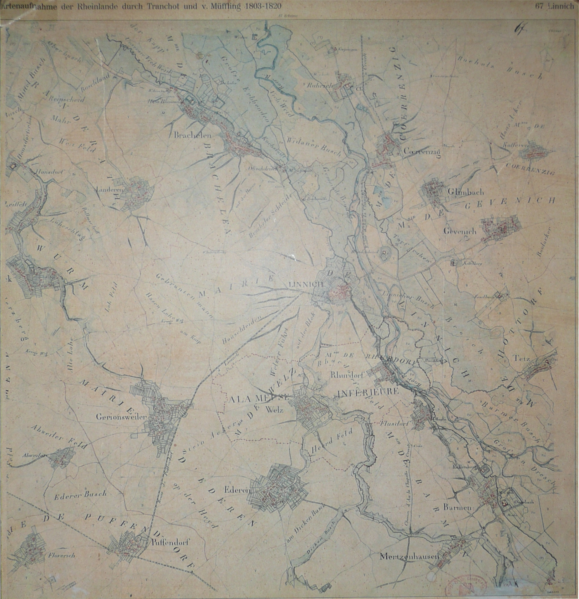 Kartenaufnahme der Rheinlande durch Tranchot und von Müffling 1803-1820